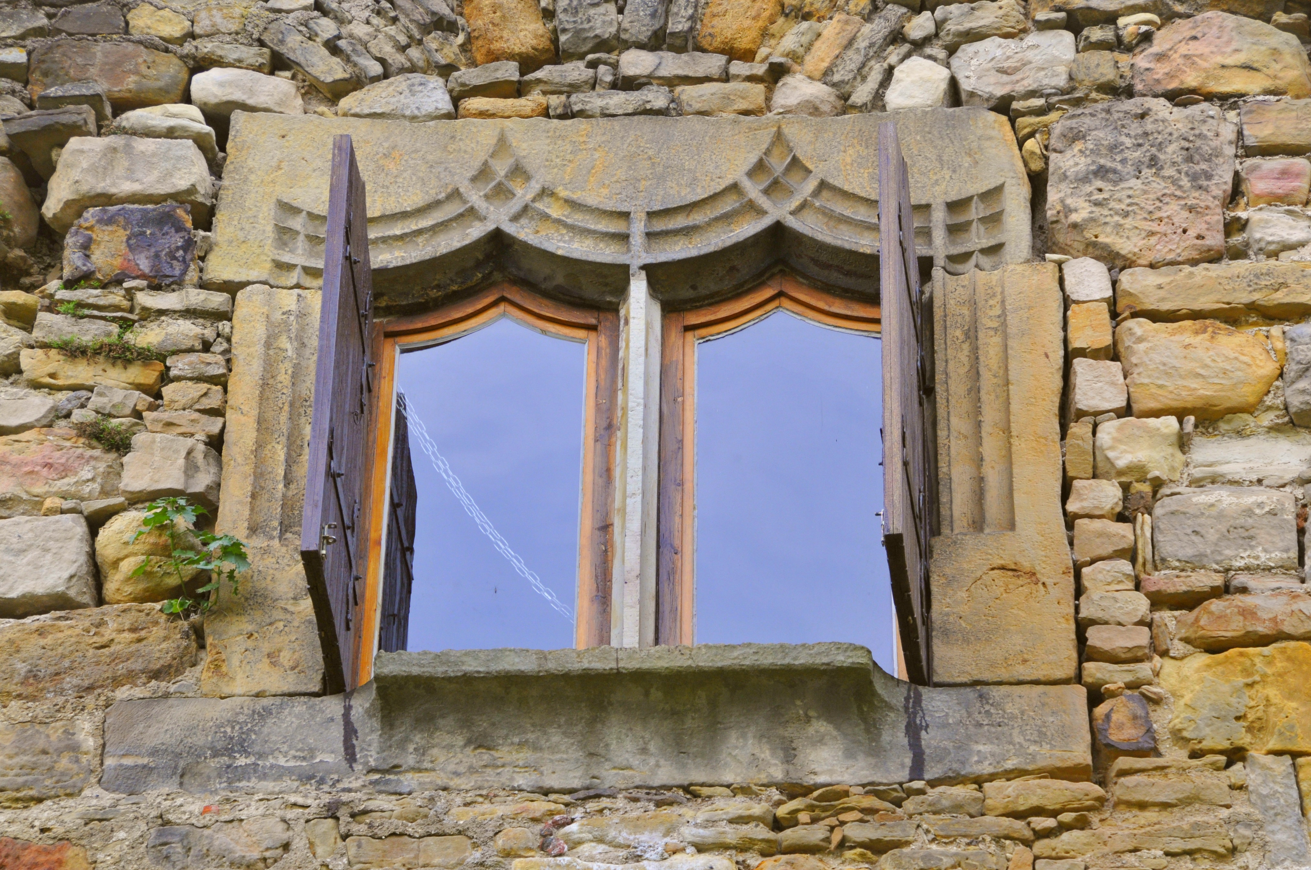 Burg Gleichen, Fenster des Kanzleigebäudes mit Verzierungen